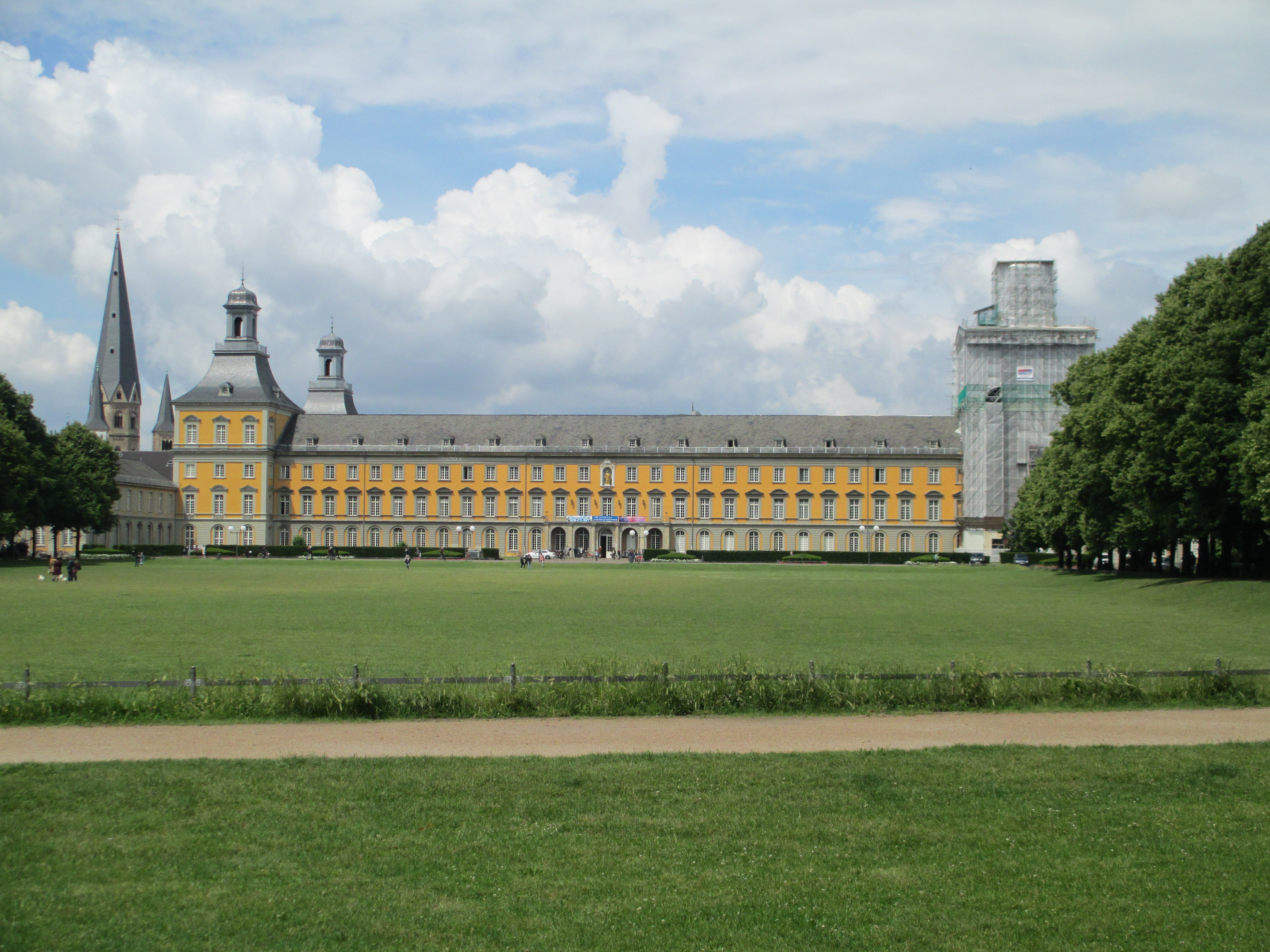 אוניברסיטת בון